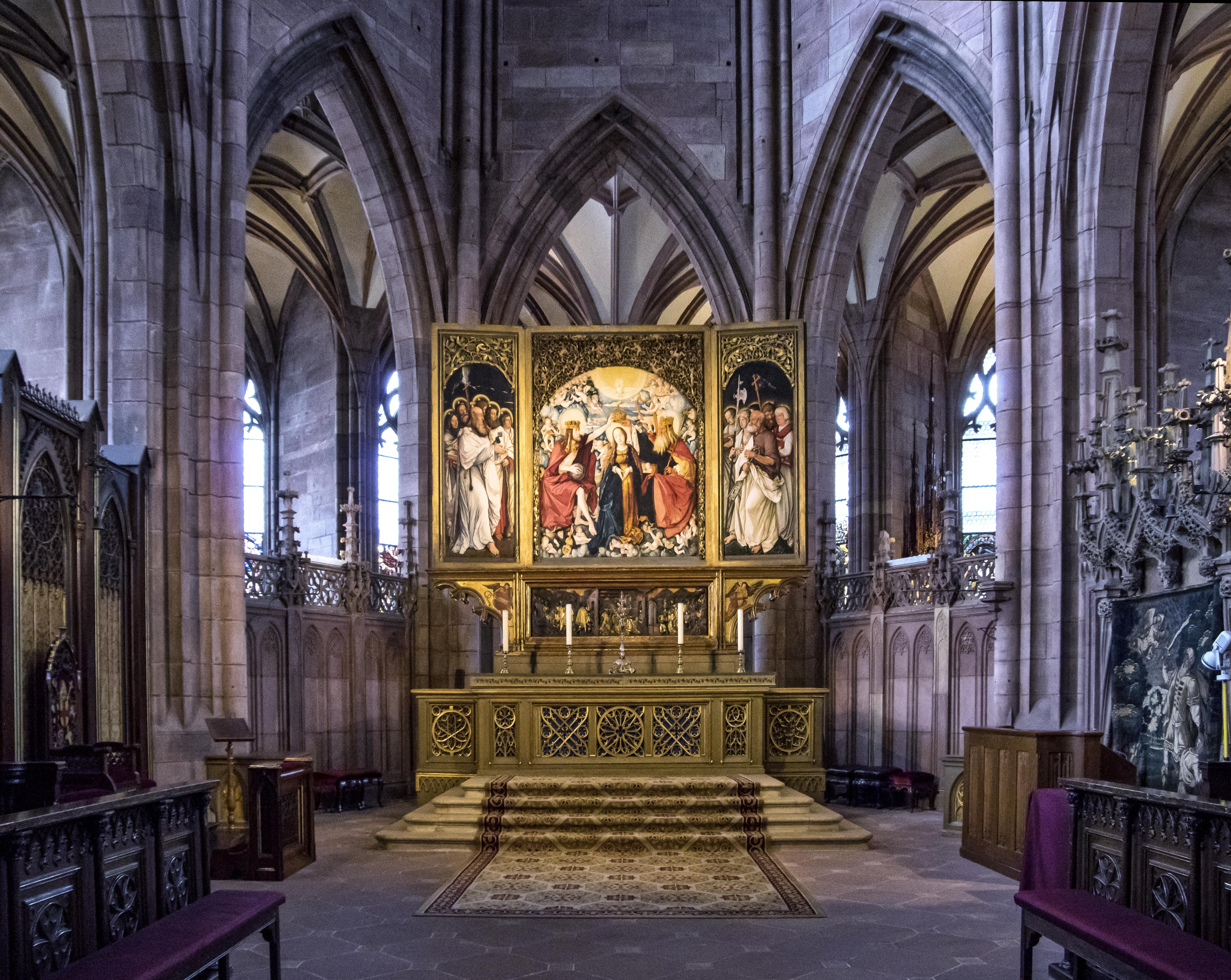 Bilder aus Freiburg Bilder vom Hauptaltar im Münster Der Altar im Chor